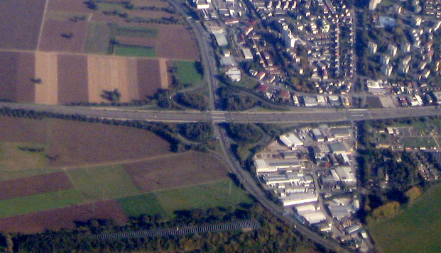 Autobahnkreuz Weinheim